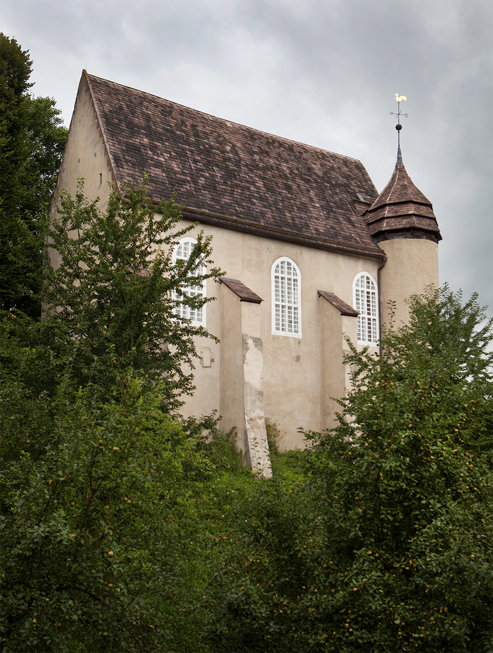 Schloss Varenholz, Schlosskirche This is the photograph of an architectural monument. It is part of the list of cultural monuments of Kalletal